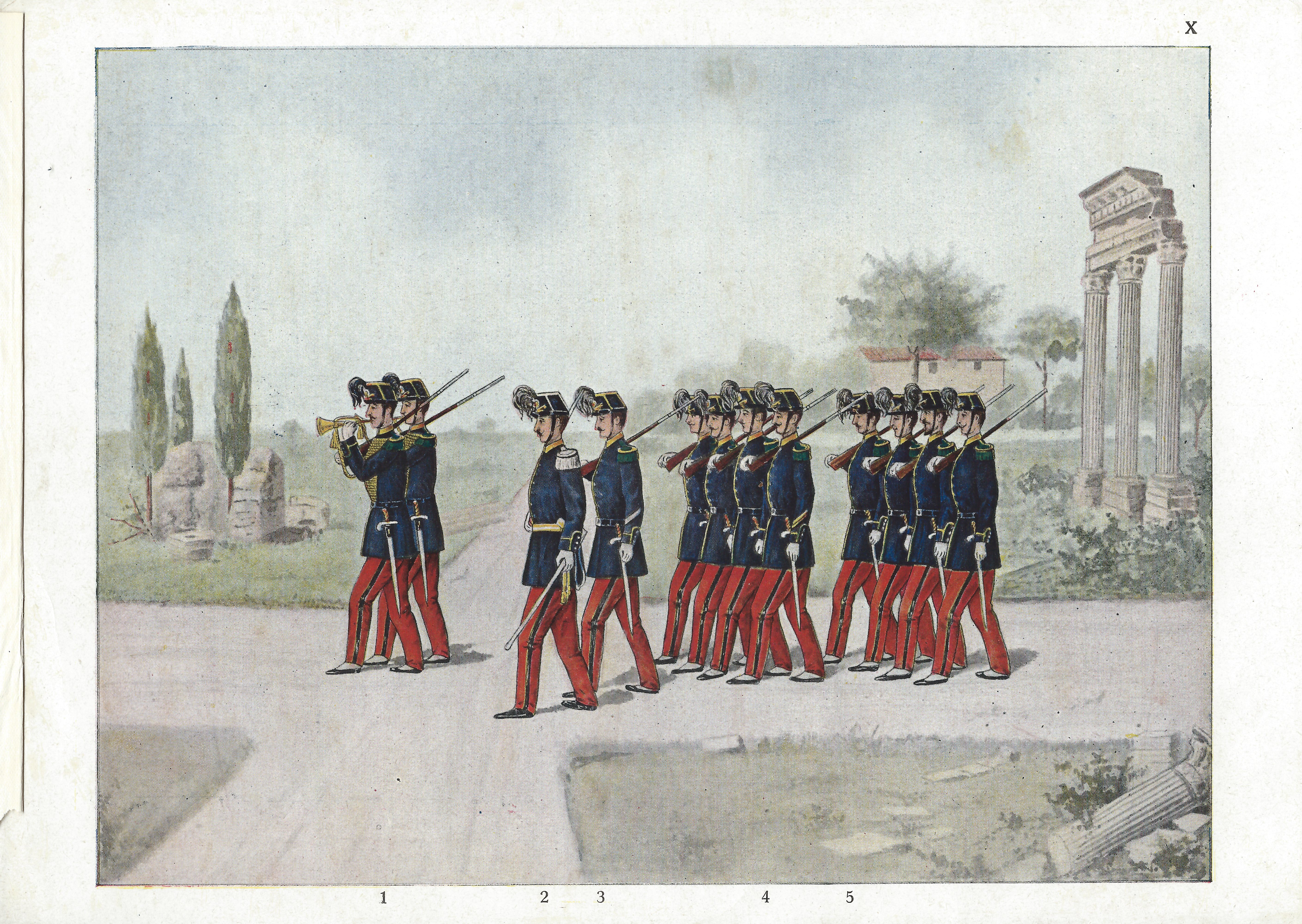 1 trmbe 2 tenente 3 sergente 4 caporale maggiore 5 soldati